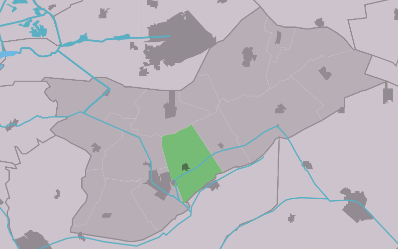 Kaartsje fan himrik fan Lippenhuzen